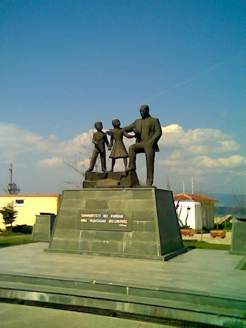 Güzelyalı Atatürk Anıtı